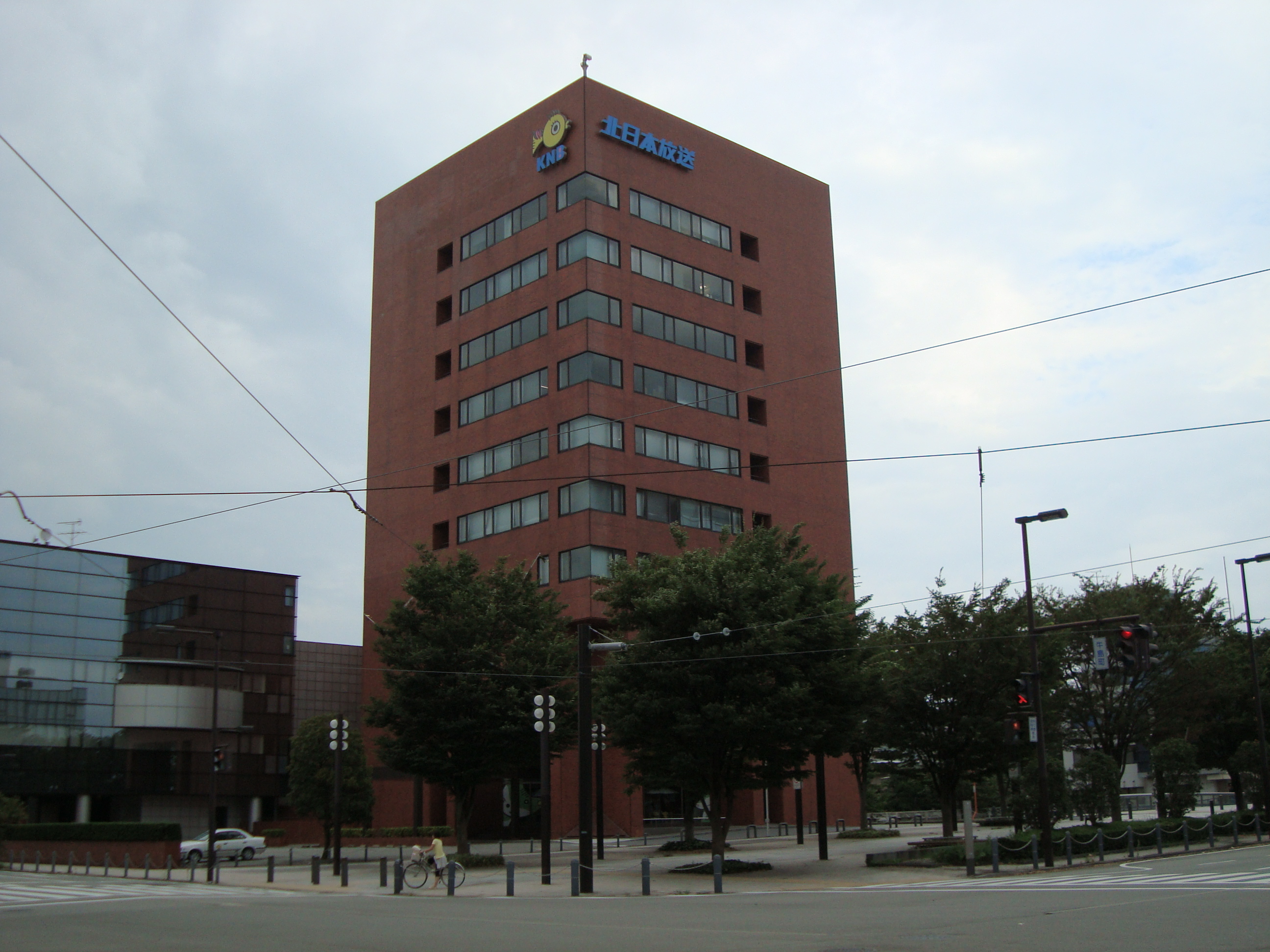 北日本放送 本社社屋 富山県富山市牛島町